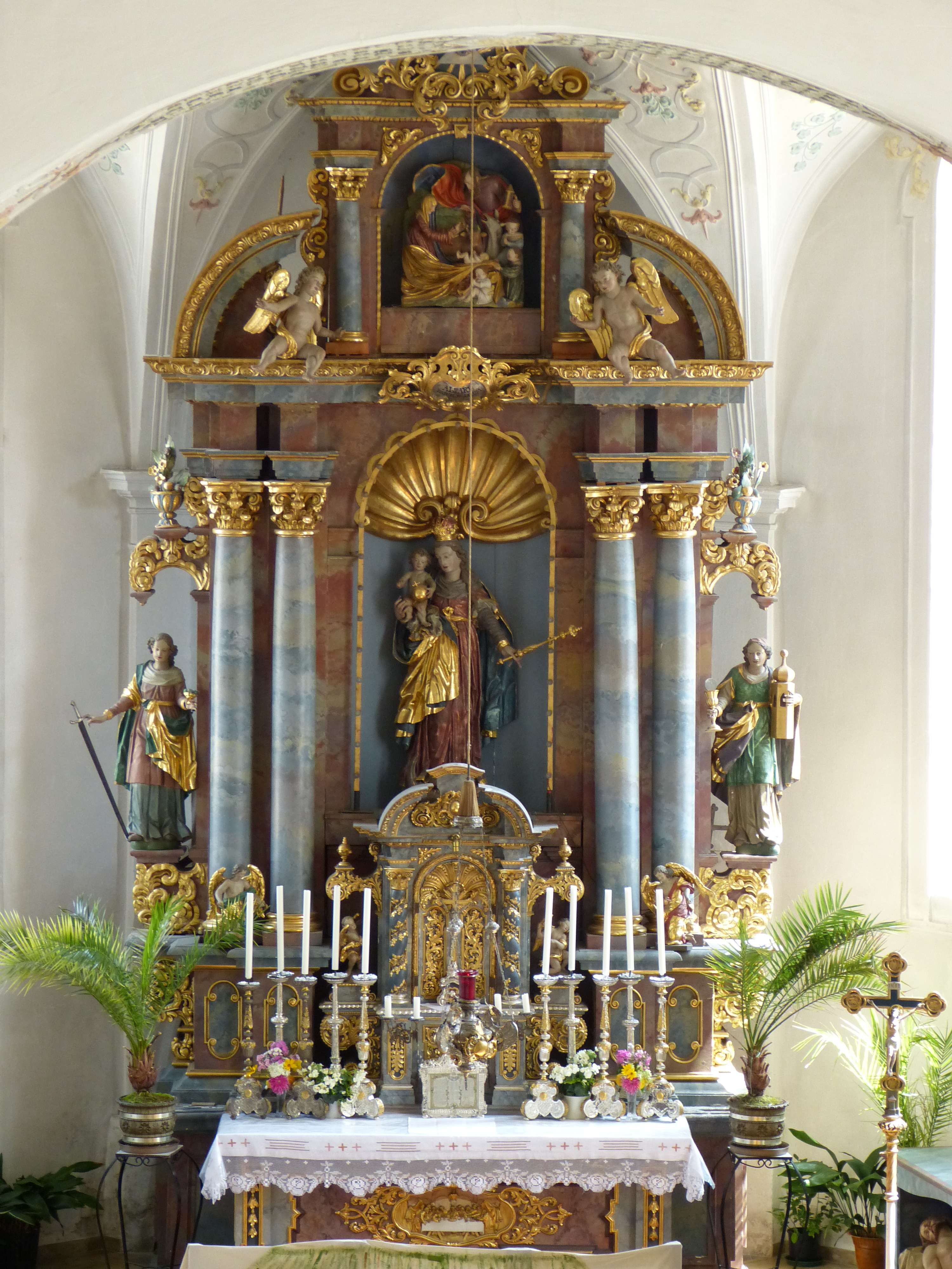 Mariä Himmelfahrt, Oberkammlach, Landkreis Unterallgäu, Bayern